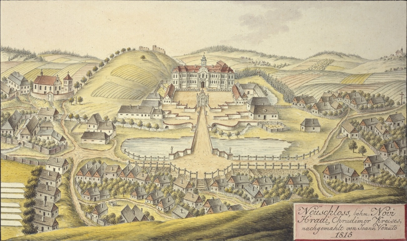 Nové Hrady (zámek, okres Ústí nad Orlicí). Neuschloss, böhm. Novi Hradi, Chrudimer Kreises, nachgemahlt von Joann Venuto 1815